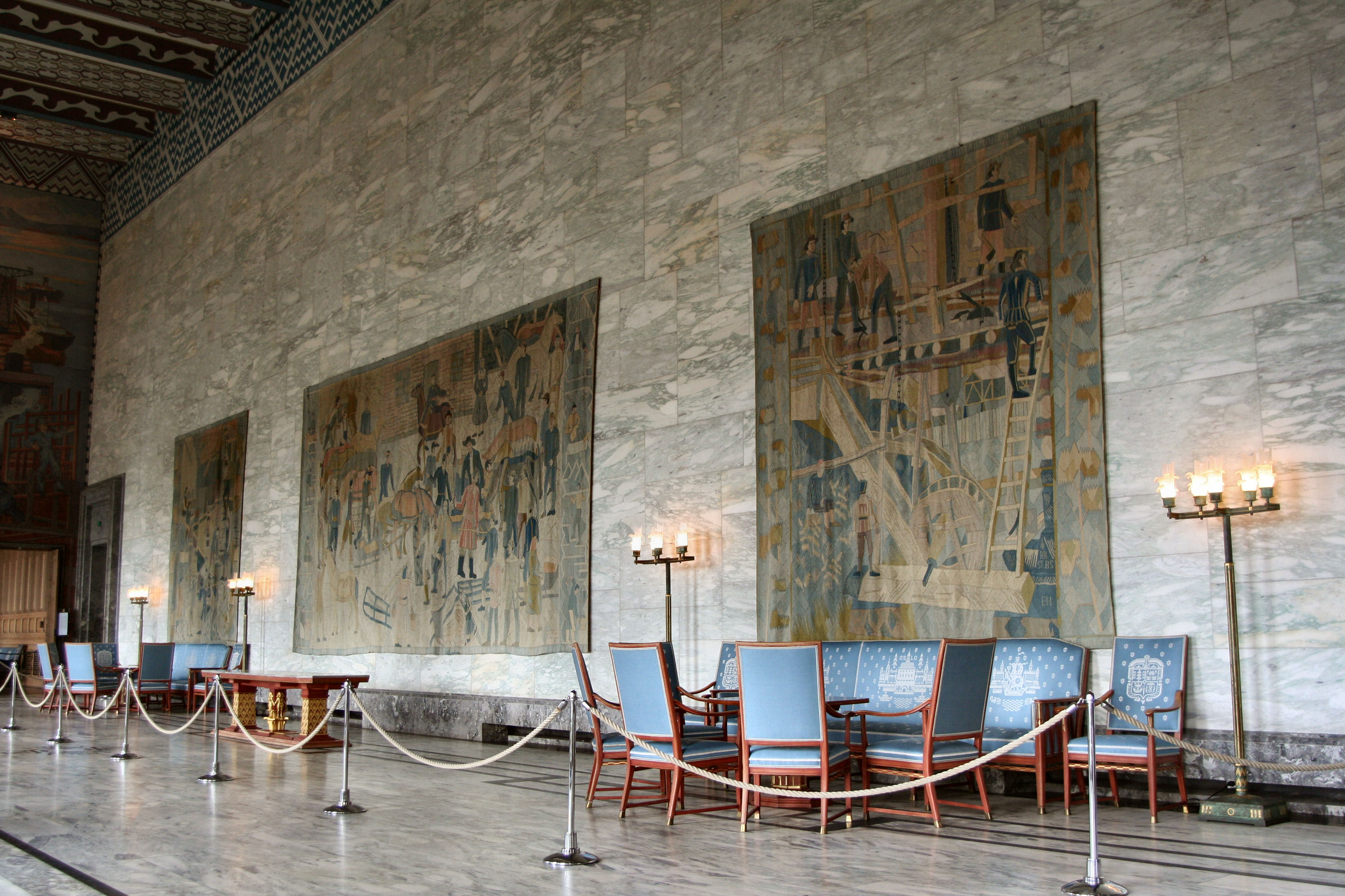 Tapistries, display in the festive hall, Oslo Town Hall, design by Kåre Jonsborg, woven by Else Halling 2006.